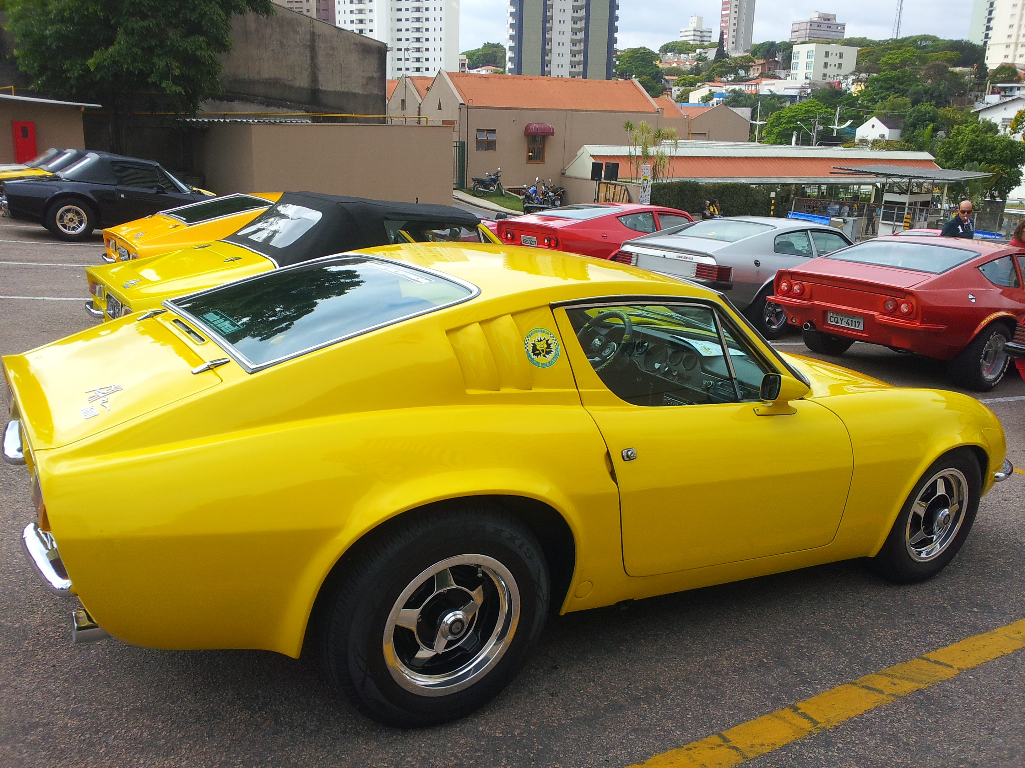 5º encontro Puma Jundiaí 2012_"Bulevar Beco Fino"_Av.Nove de Julho.